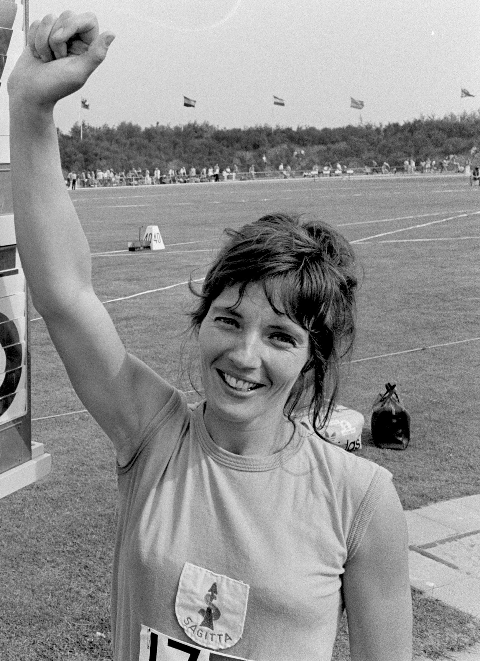 Nederlandse atletiekkampioenschappen 1974 op Papendal; een gelukkige Ciska Janssen bij het scorebord